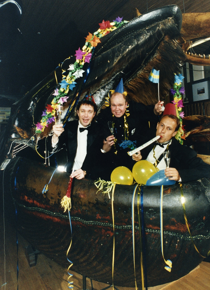 Musikgruppen Triple & Touch från vänster till höger Göran Rudbo, Lars Kronér, Ken Wennerholm sittande i Malmska valens öppning. Dekoration av ballonger, girlanger och serpentiner. :: :: Ingår i serie med fotonr. 7045:1-22 med foton från konserveringen av Malmska valen, utförd av personal från Stiftelsen Västsvensk Konservatorsatelje´ (SVK). Samlingar av Göteborgs Naturhistoriska Museum.